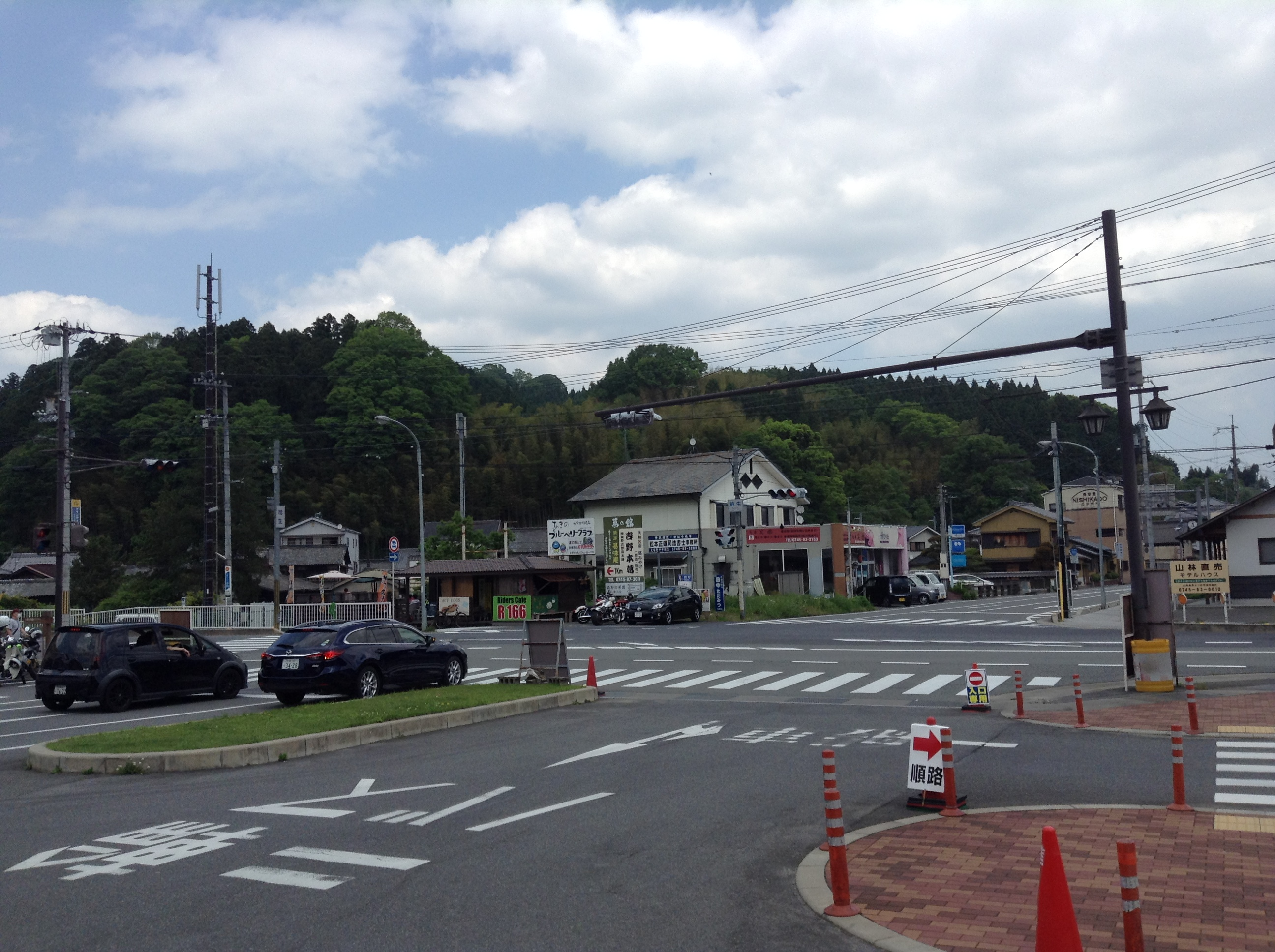 道の駅 大宇陀の、外観